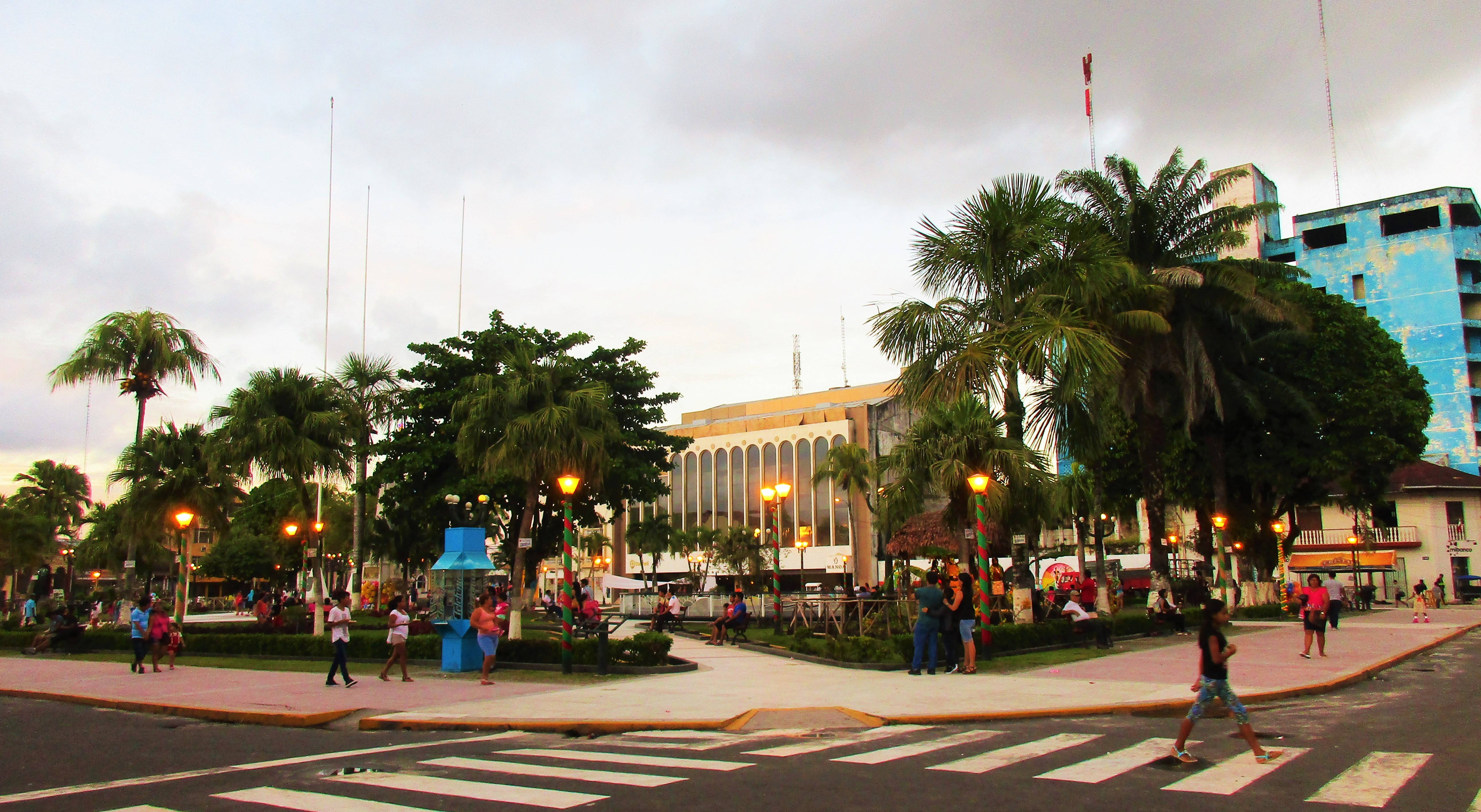 Plaza de Armas ubicado en el centro histórico y cultural de la ciudad de Iquitos en Perú.